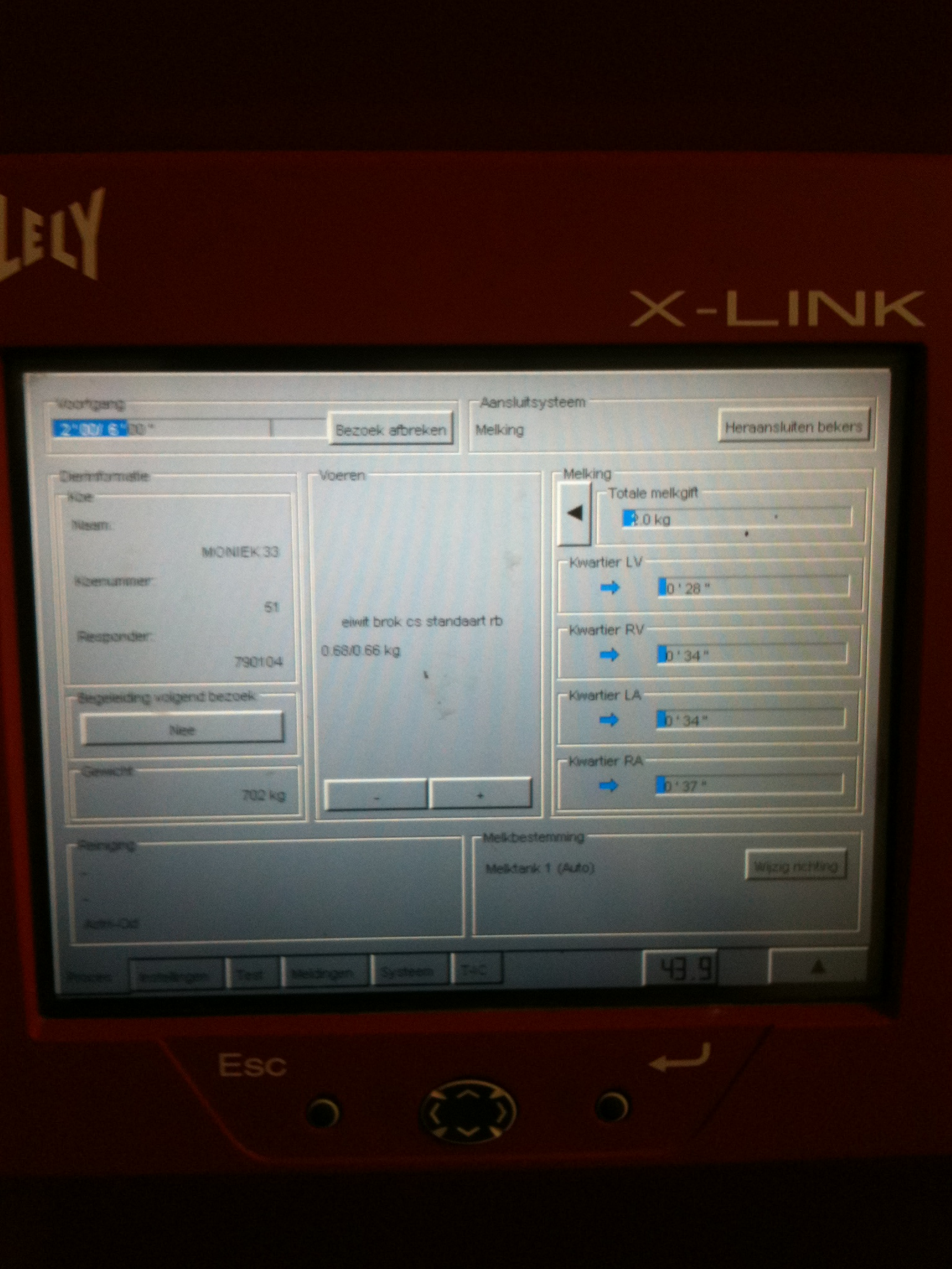 Display eines Lely Astronaut Melkroboters